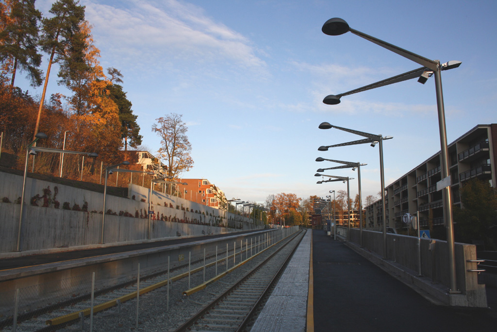 Åsjordet T-banestasjon sett fra sporet i bilderetning mot Ullernåsen T-banestasjon.